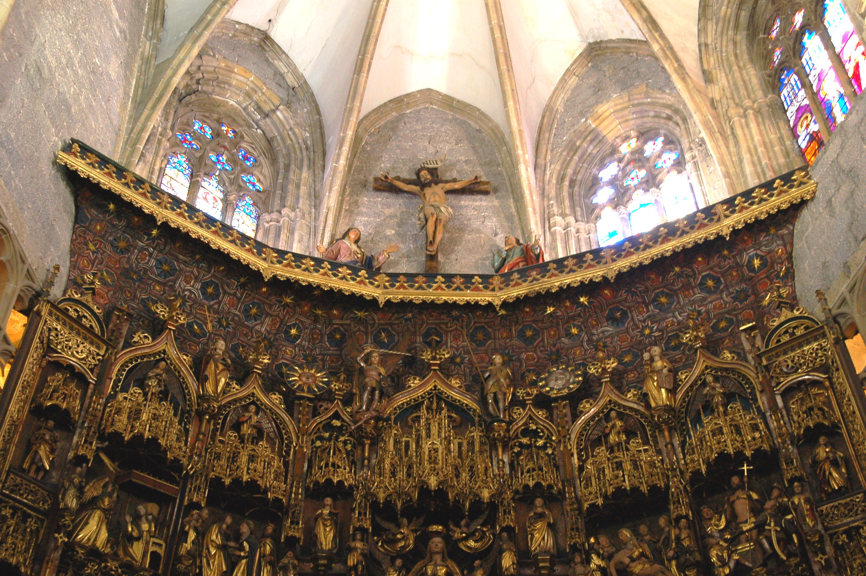 Guardapolvo mudejar del retablo